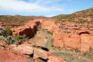 Burr Trail shortly after entering Long Canyon